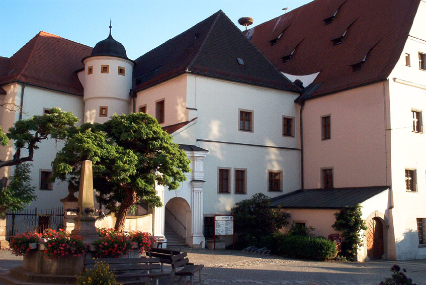 Neustadt a.d. Waldnaab - Deutschland/BY